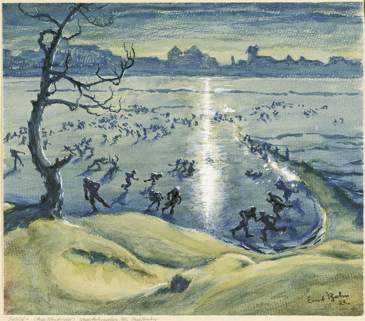 Schlittschuhläufer auf den Aawiesen in Münstertitle QS:P1476,de:"Schlittschuhläufer auf den Aawiesen in Münster" label QS:Lde,"Schlittschuhläufer auf den Aawiesen in Münster"